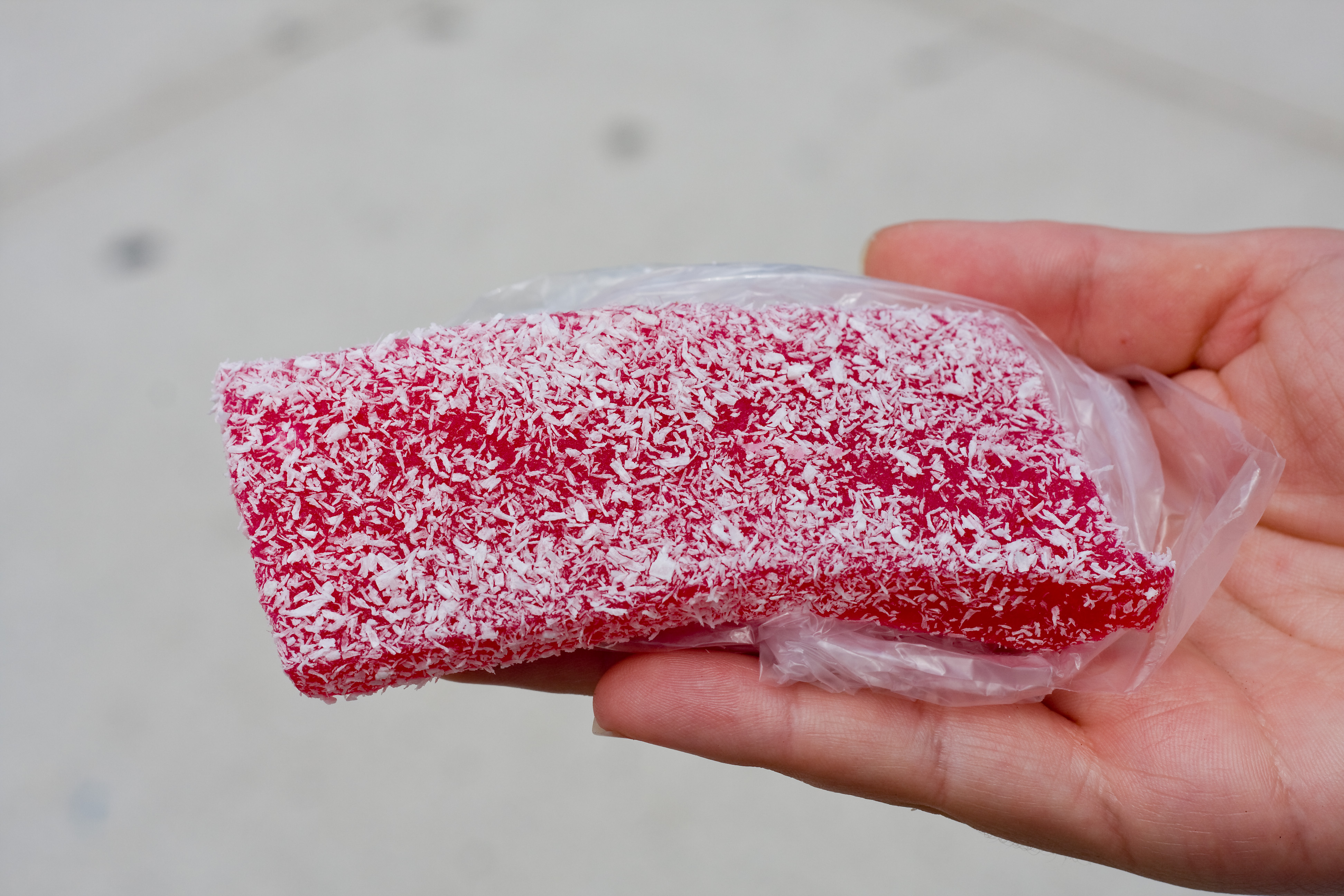 Ongol-ongol